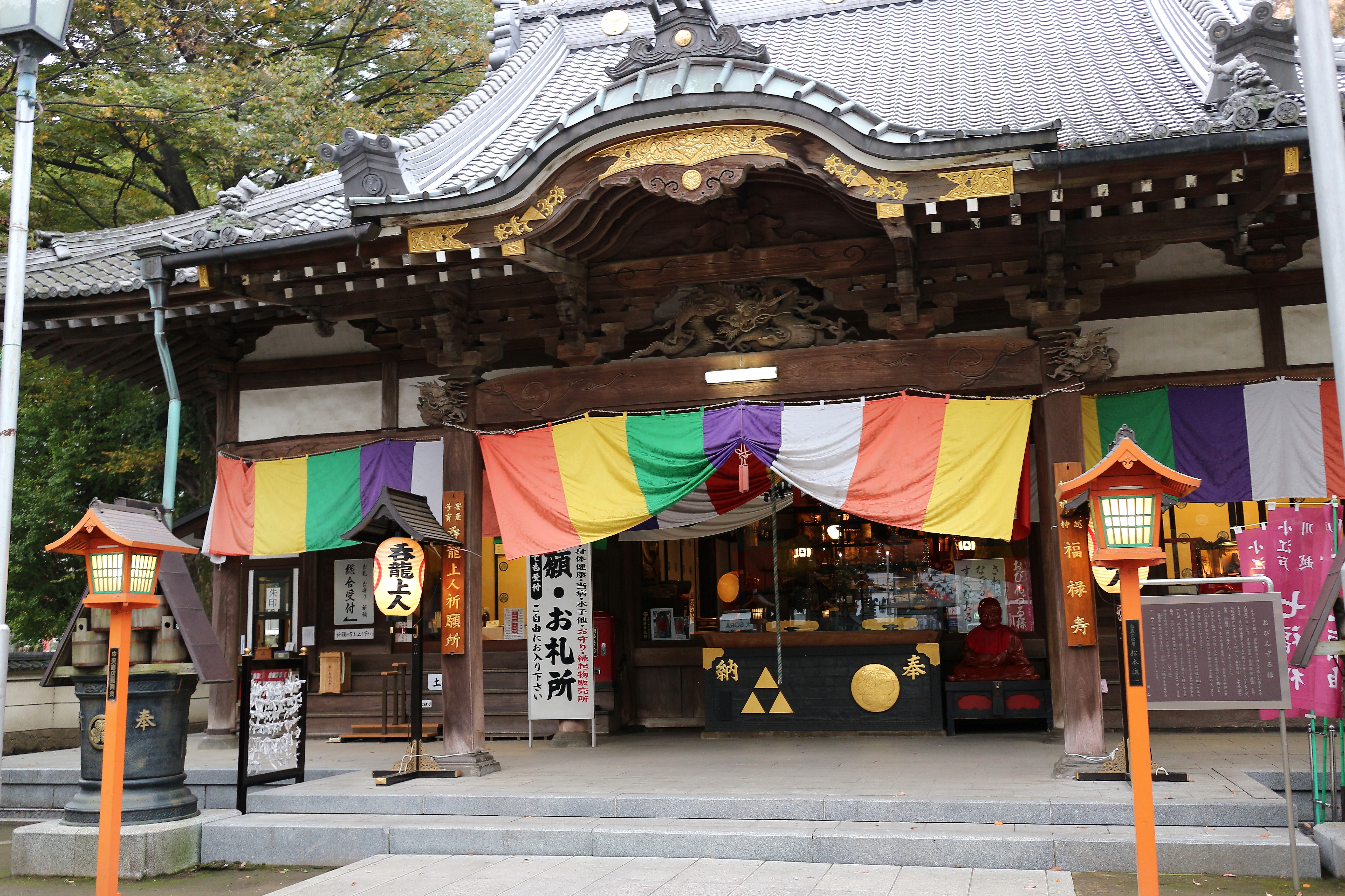 小江戸川越七福神 第五番 (福禄寿神) Canon EOS M2